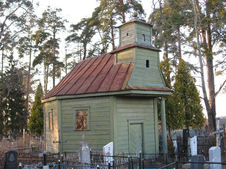 Астрашыцкі Гарадок. Капліца